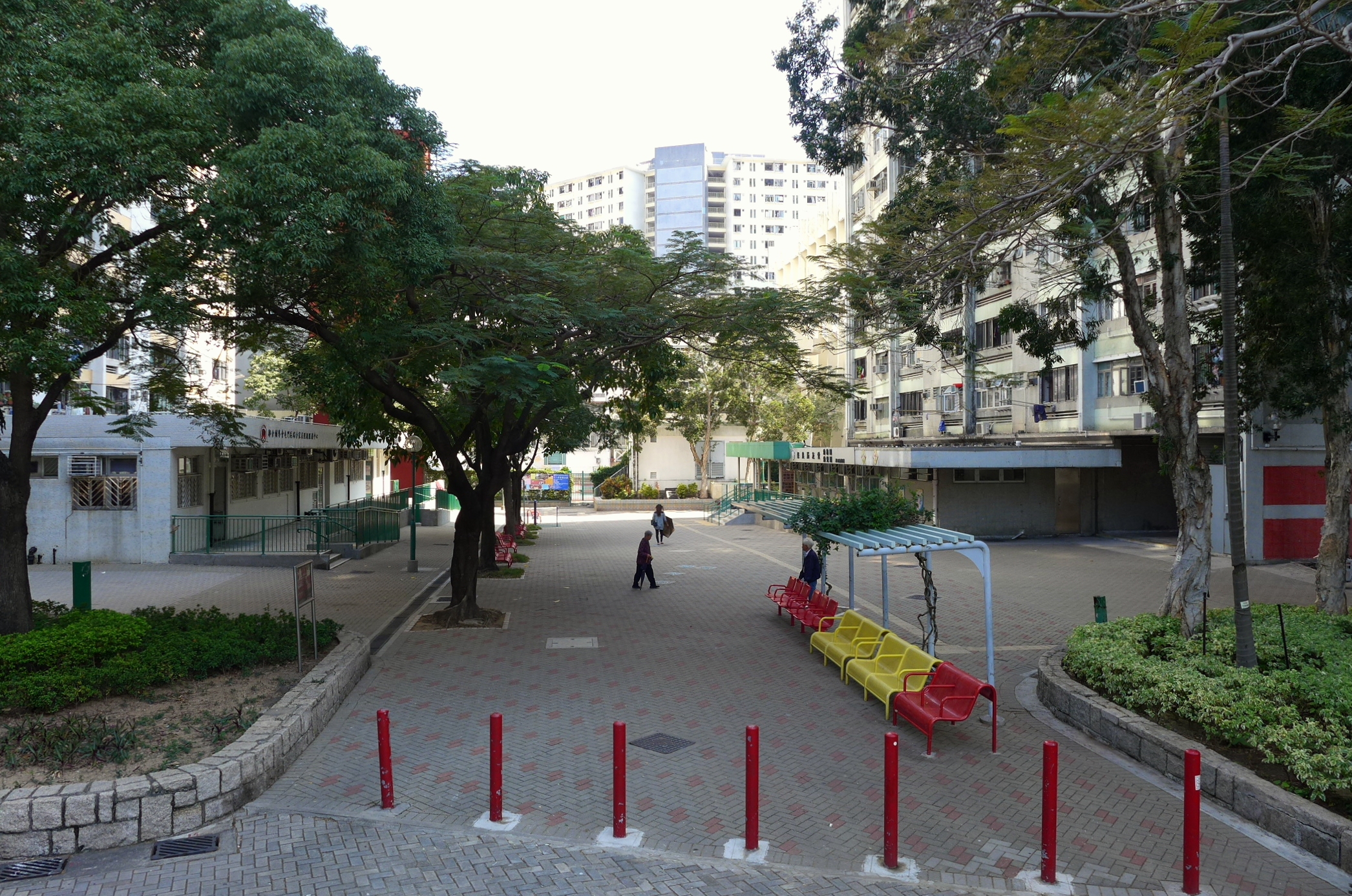 Yau Oi Estate Garden